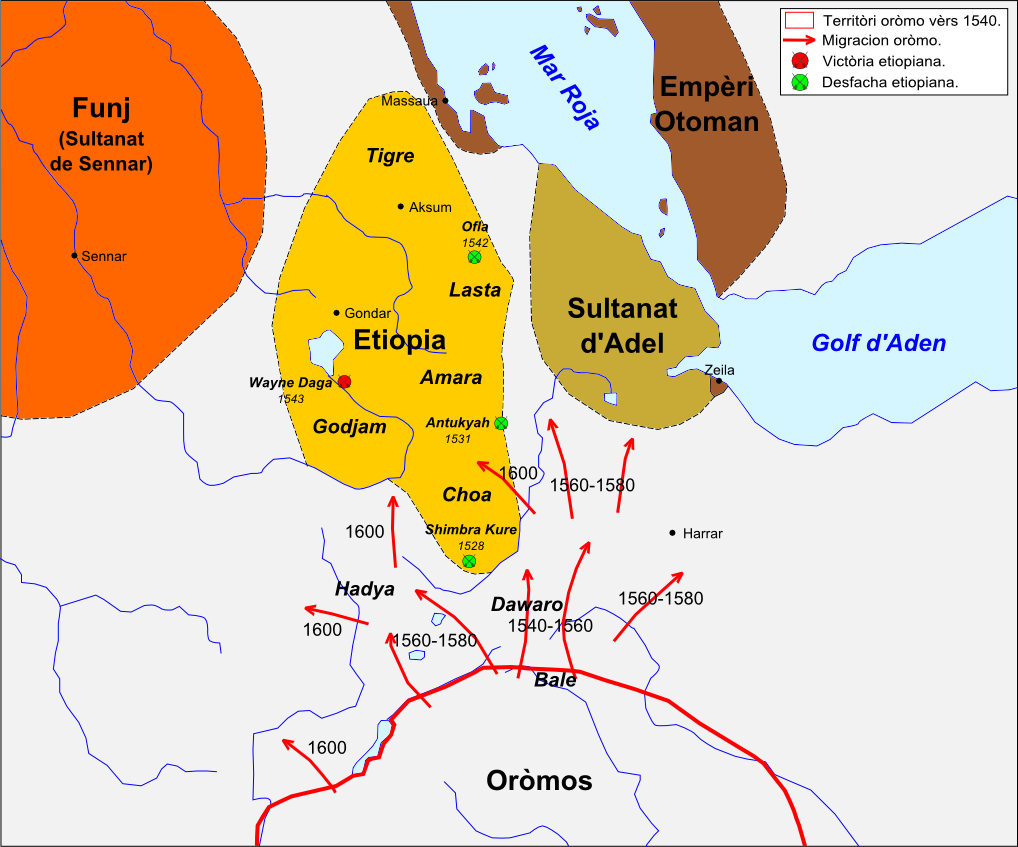 Territòri etiopian au sègle XVII.